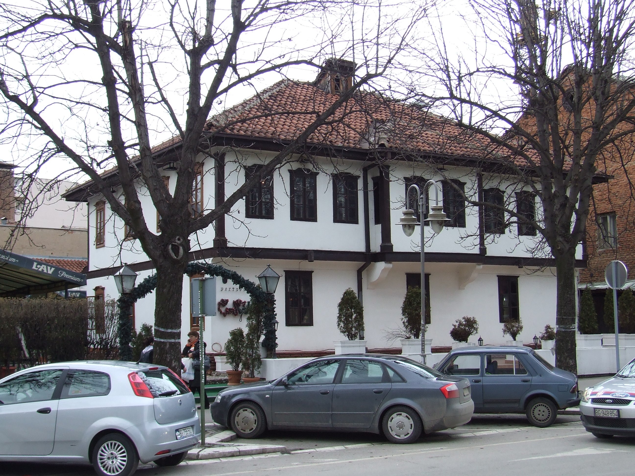 Кућа Стамболијевих у Нишу. Снимљено у фебруару 2010. Licensing